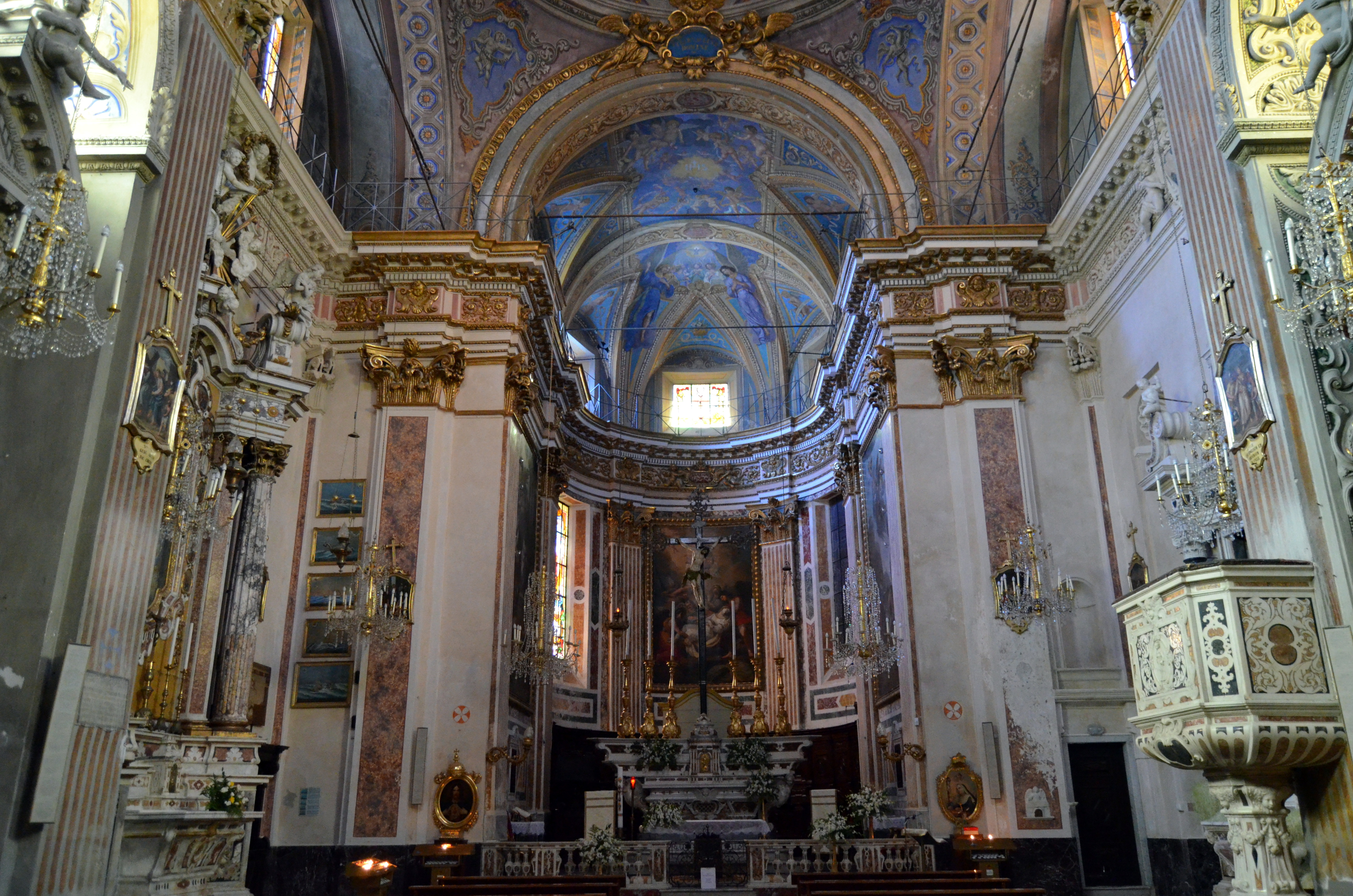 Navata centrale della chiesa di Santa Caterina, Bonassola, Liguria, Italia